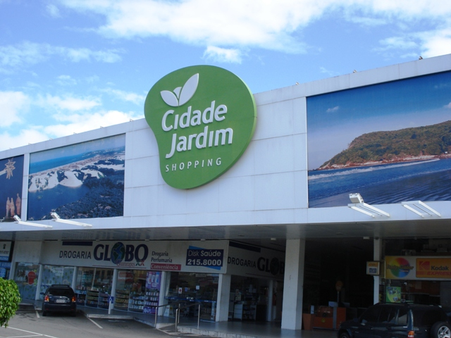 Shopping Cidade Jardim em Natal, Rio Grande do Norte, Brasil